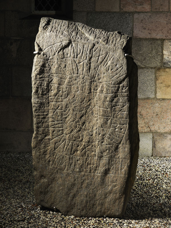 Foto: Nationalmuseet ved Roberto Fortuna